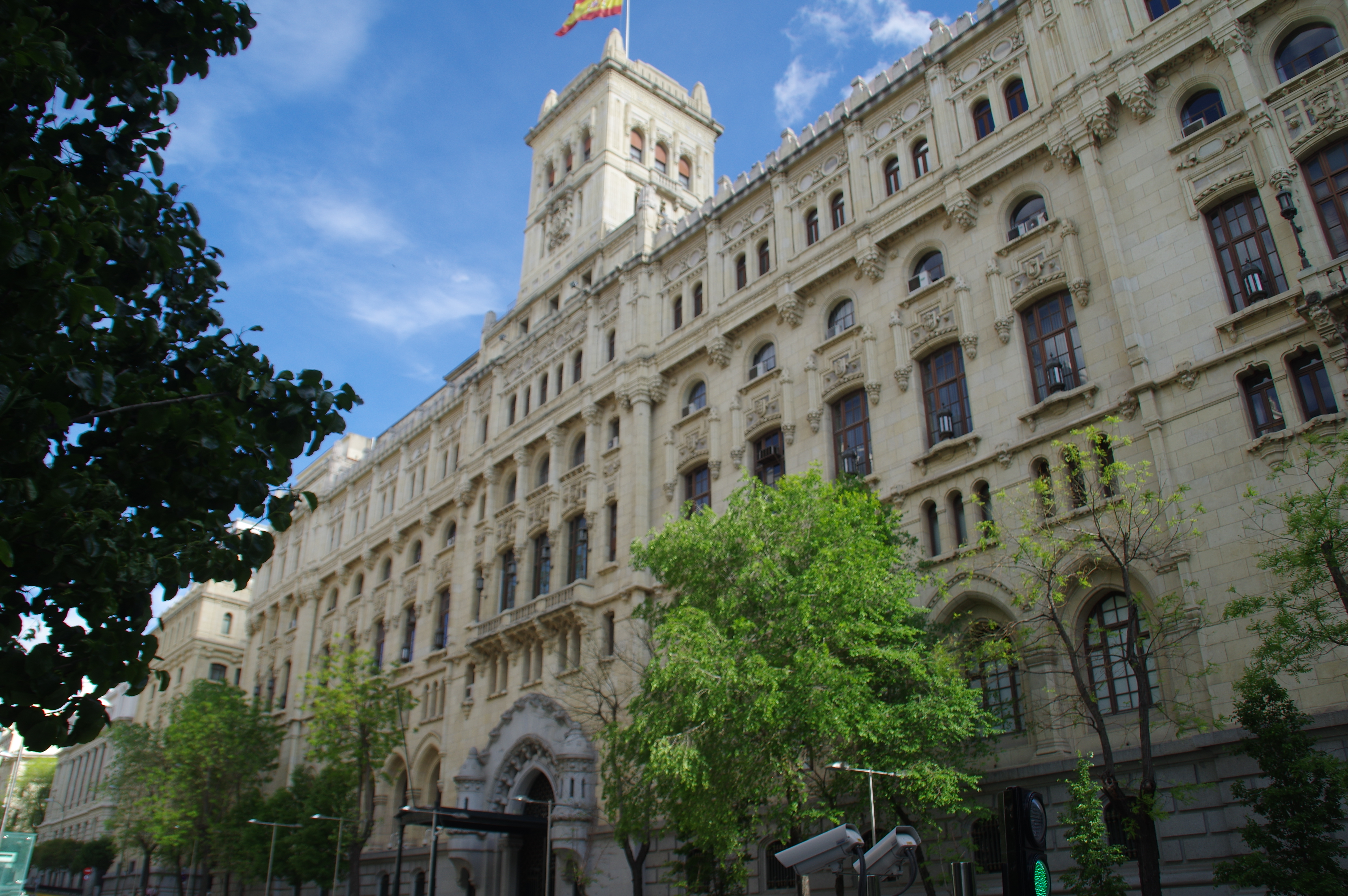 VIEW : @'s / DiDi / RM / Ð 6K / ┼ : MADRID_C.G.ARMADA_EXTERIOR